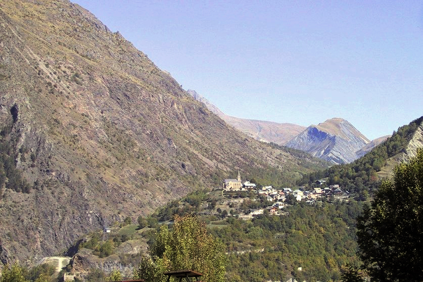 Mizoën vun der Strooss aus gesinn déi op Les Deux-Alpes féiert.